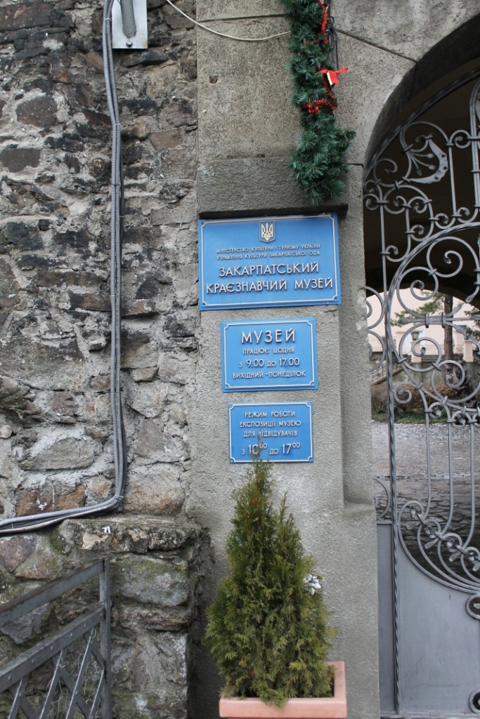 Закарпатський краєзнавчий музей, вивіска при вході